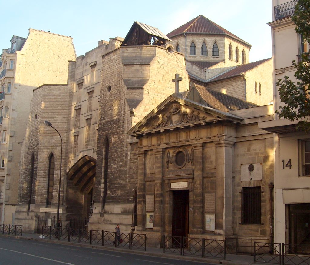 La basilique Sainte-Jeanne d'Arc et l'église Saint-Denys